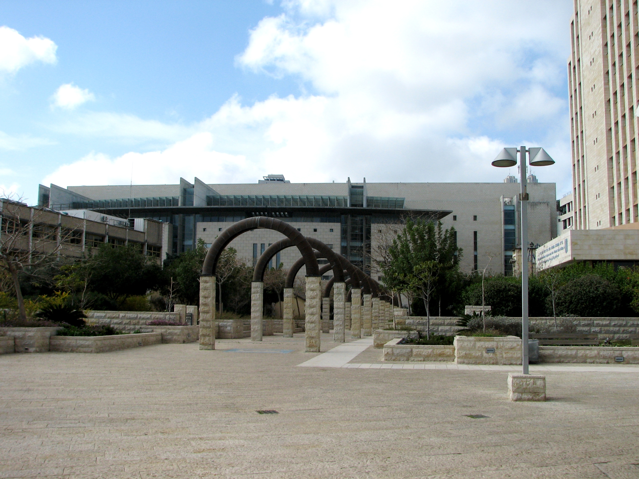 The Courts Hall of Haifa, Israel. היכל המשפט בחיפה, בקריית הממשלה בעיר התחתית צילום מבנה היכל המשפט על רק טיילת הקשתות בקריית הממשלה